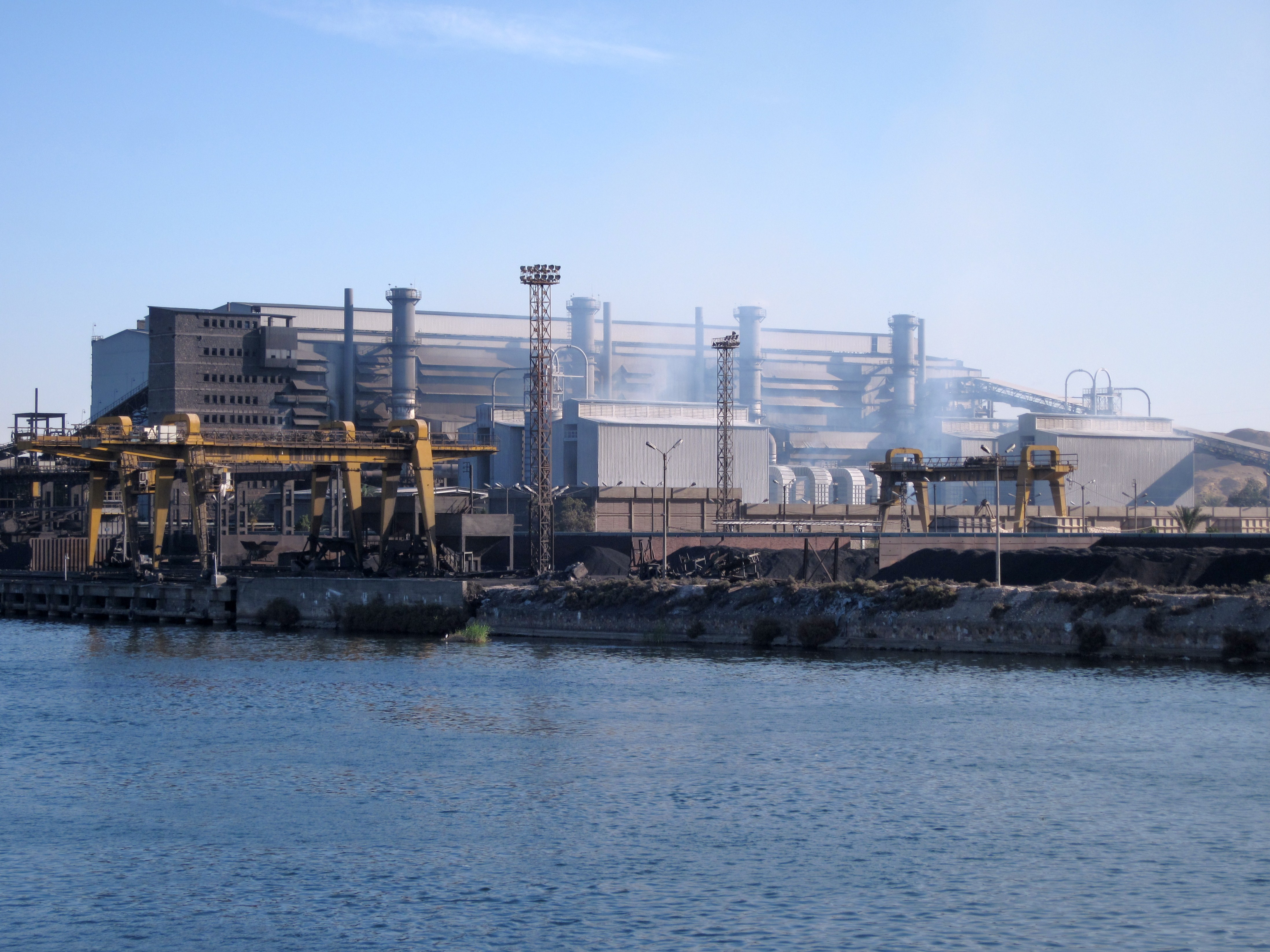 Industrieanlage am Nil bei Edfu, Ägypten